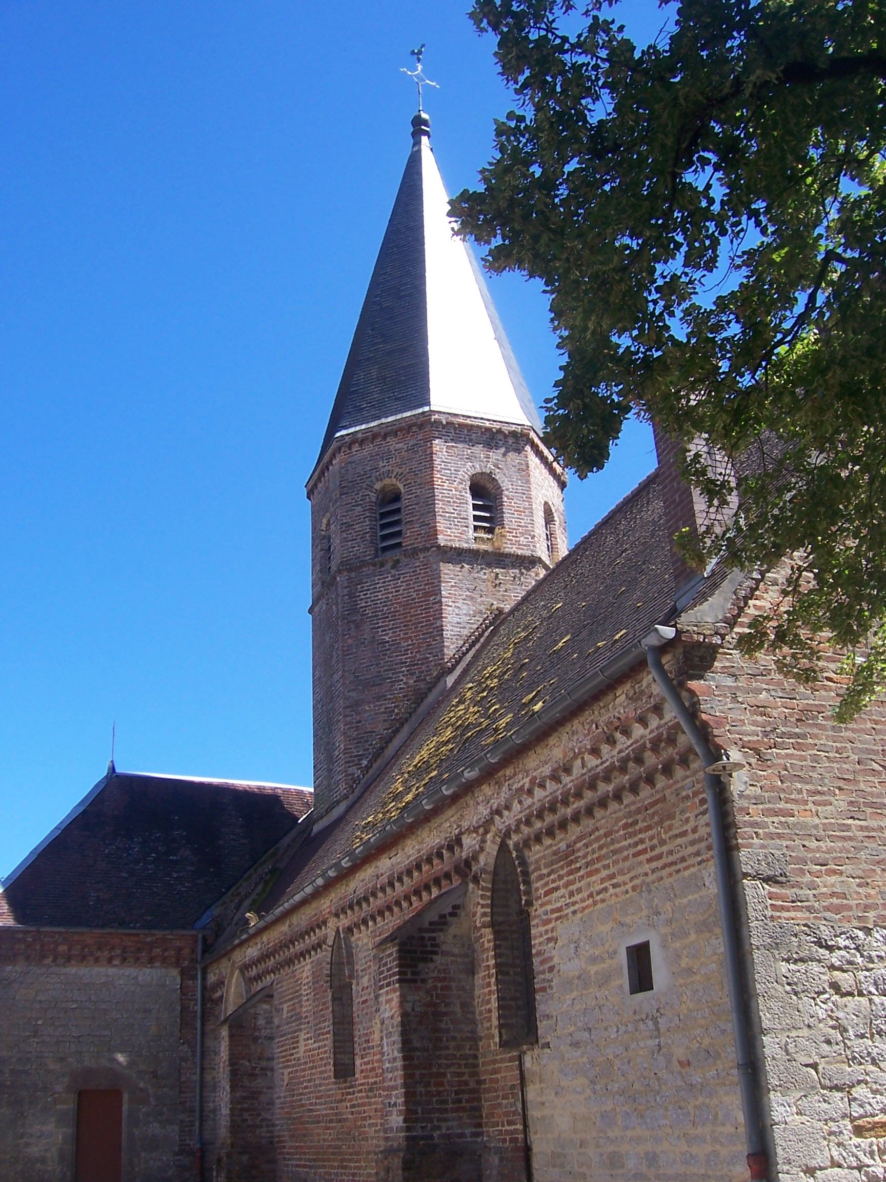 Eglise de Frontenaud